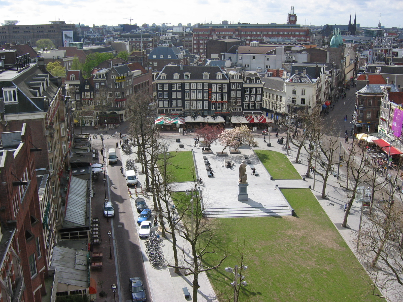 Verbouwing van het voormalige ABN-Amro hoofdkantoor aan het Rembrandtplein te Amsterdam Rondleiding op woensdag 21 april 2010 voor de architecten van de BNA Kring Amsterdam-Kennemerland, door Frits van Dongen van de Architecten Cie.